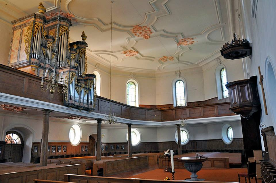 Innenraum der reformierten Kirche von Bad Zurzach